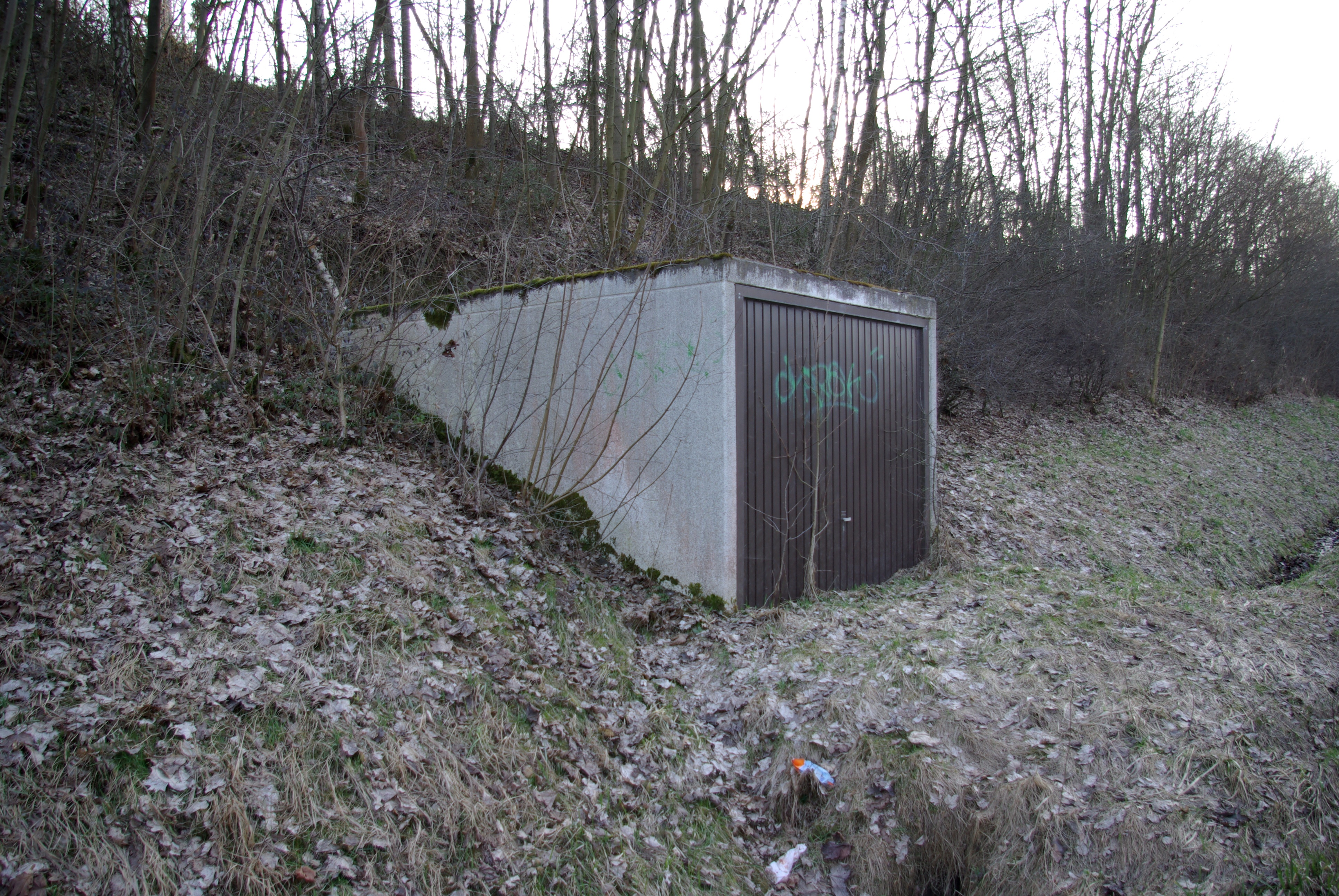 Herzogenauracher Straße im Fürther Stadtteil Vach an der Trogbrücke des Main-Donau-Kanals. Ein sogenanntes Sperrmittelhaus, in diesem Fall eine gewöhnliche Garage. Dort lagern bzw. lagerten alle Materialien zur Installation einer Trägerstecksperre, einer Vorbereitete Sperre aus Zeiten des Kalten Krieges. In der unmittelbaren Nähe befinden sich Schächte in der Fahrbahn der Herzogenauracher Straße, die im geschlossenen Zustand an Gullydeckel erinnern. In diese hätte man im Verteidigungsfalle innerhalb von zwei Stunden 2,20 m lange I-Träger mit einem Gewicht von je 216 kg gesteckt. Im eingesteckten Zustand ließen sich die ca. 1,4 m aus der Straße ragenden Träger nicht mehr aus den Schächten ziehen, womit eine praktisch zerstörungsfreie Panzersperre geschaffen werden sollte.